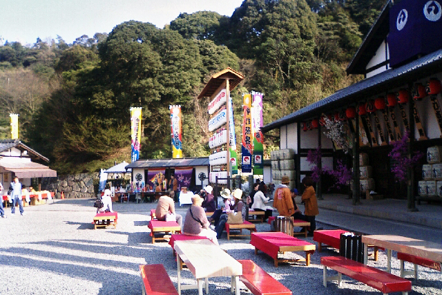 旧金比羅大芝居の建物前風景（歌舞伎の劇場） - 日本国香川県琴平町。